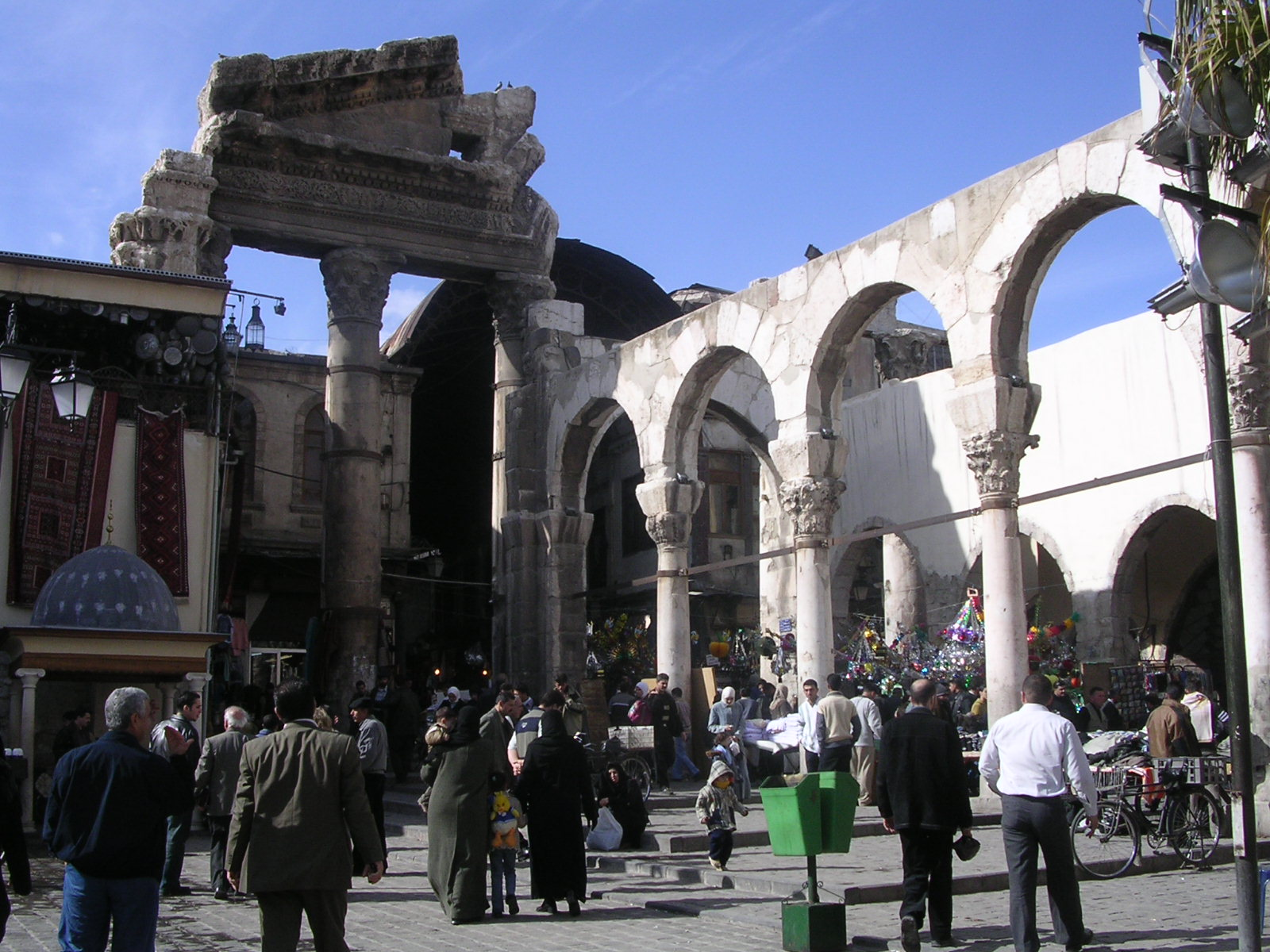 Arche romaine de Damas.